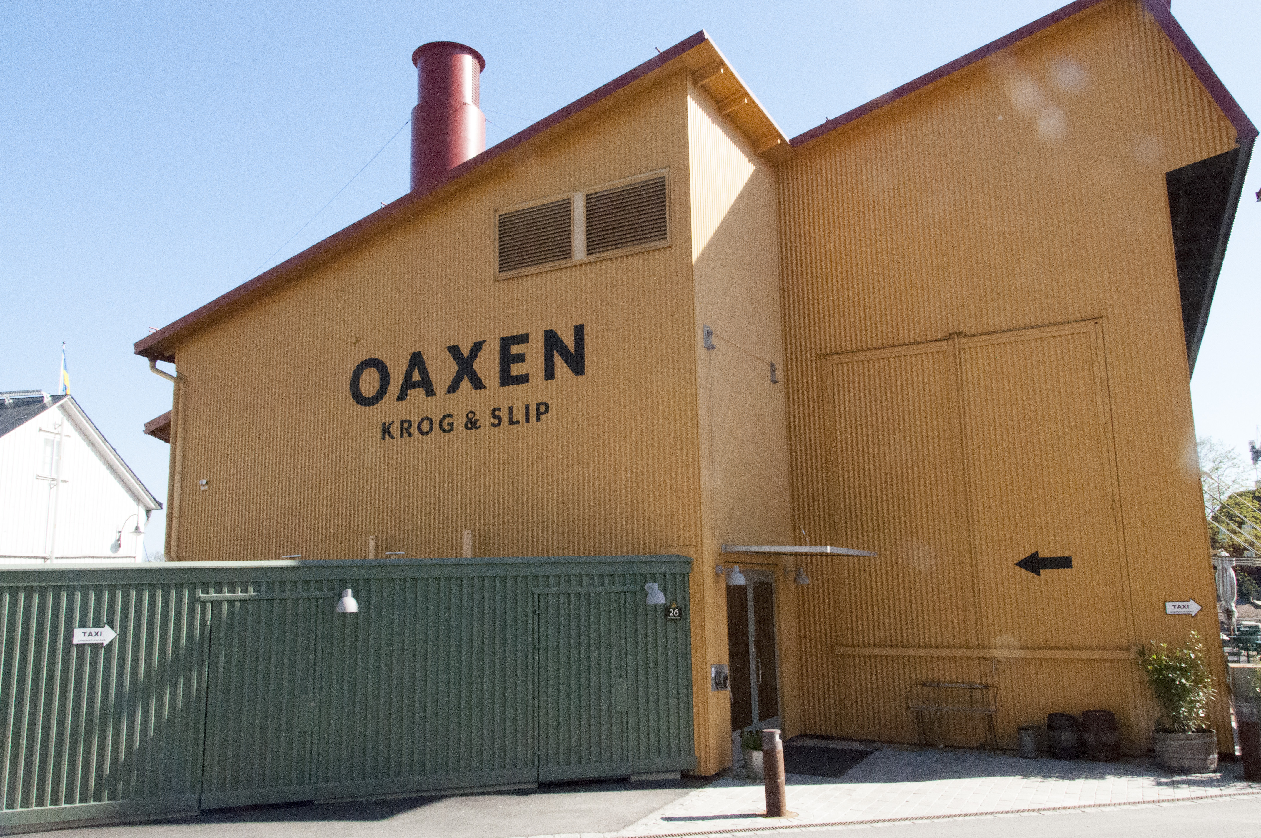 Oaxen Krog & Slip, Beckholmsvägen 26, Byggnadsår 2013, Arkitekter: Mats Fahlander och Agneta Pettersson. Byggherre: Kungliga Djurgårdsförvaltningen och Oaxen Krog